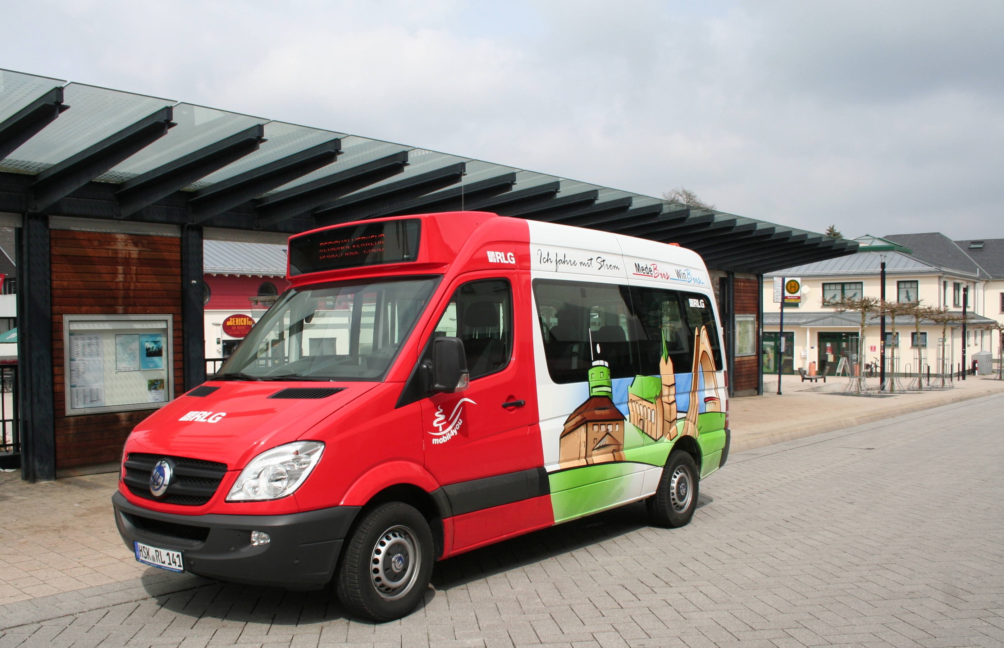 Elektrobus der RLG